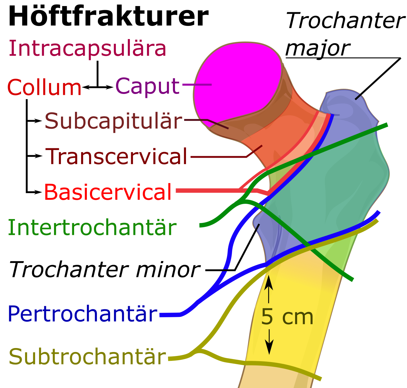 Indelning av höftfrakturer.